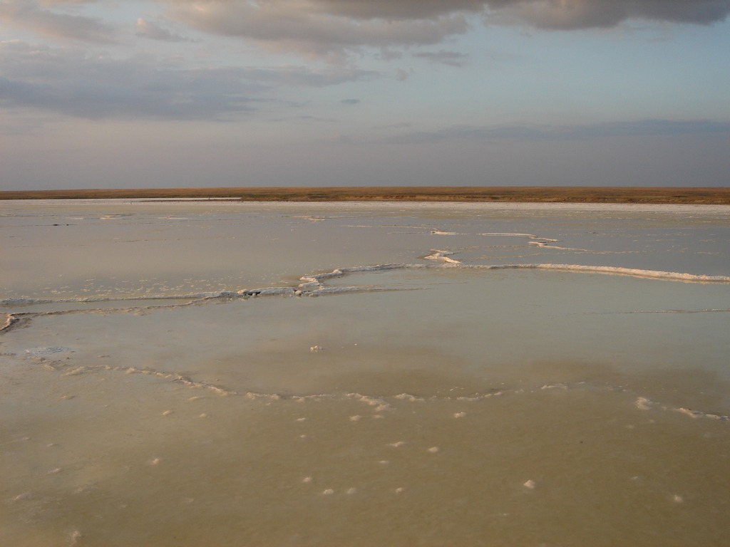 Lake Elton in summer